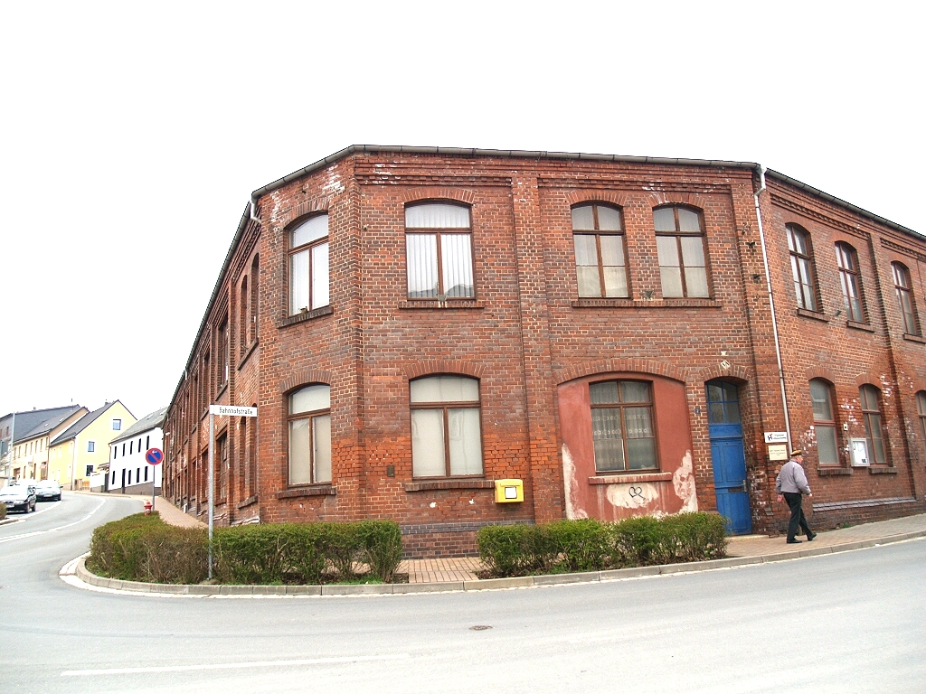 Industriegebäude aus roten Ziegelsteinen